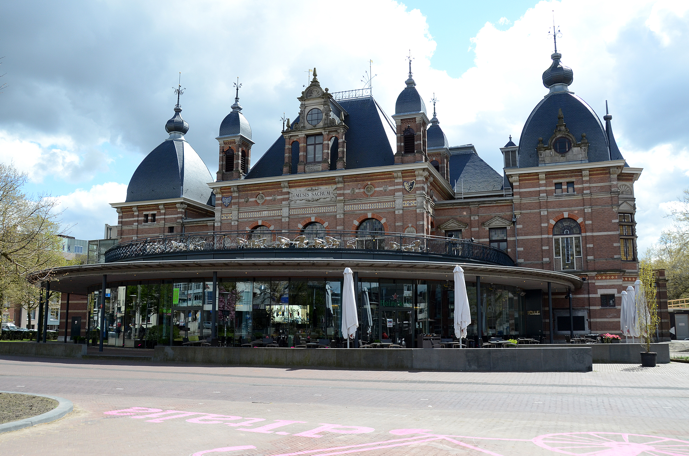 Musis Sacrum is een concertzaal en zalencentrum in Arnhem, gelegen aan het Velperplein.